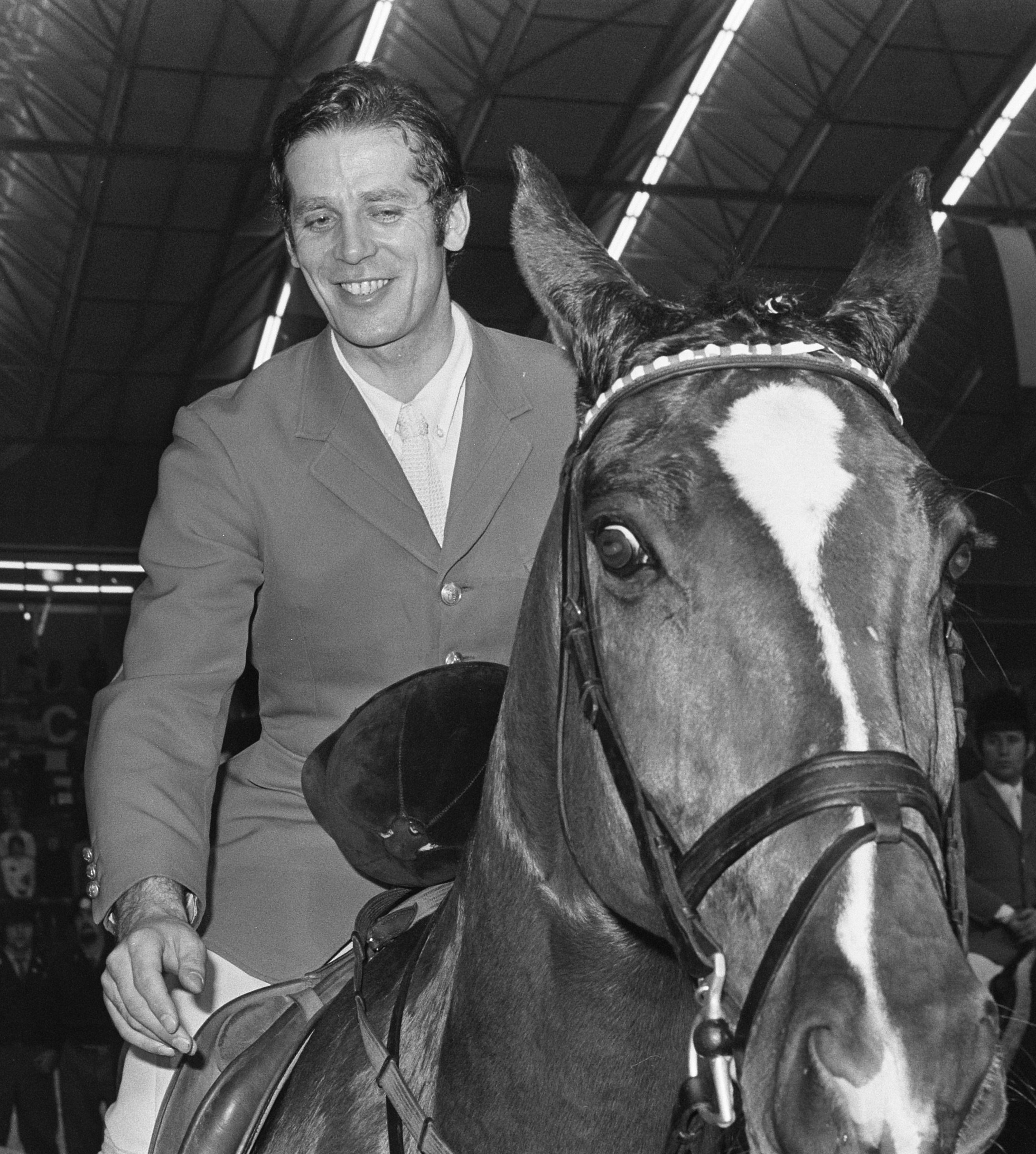 Jumping Amsterdam in de RAI, Alwin Schockemohle met Wei